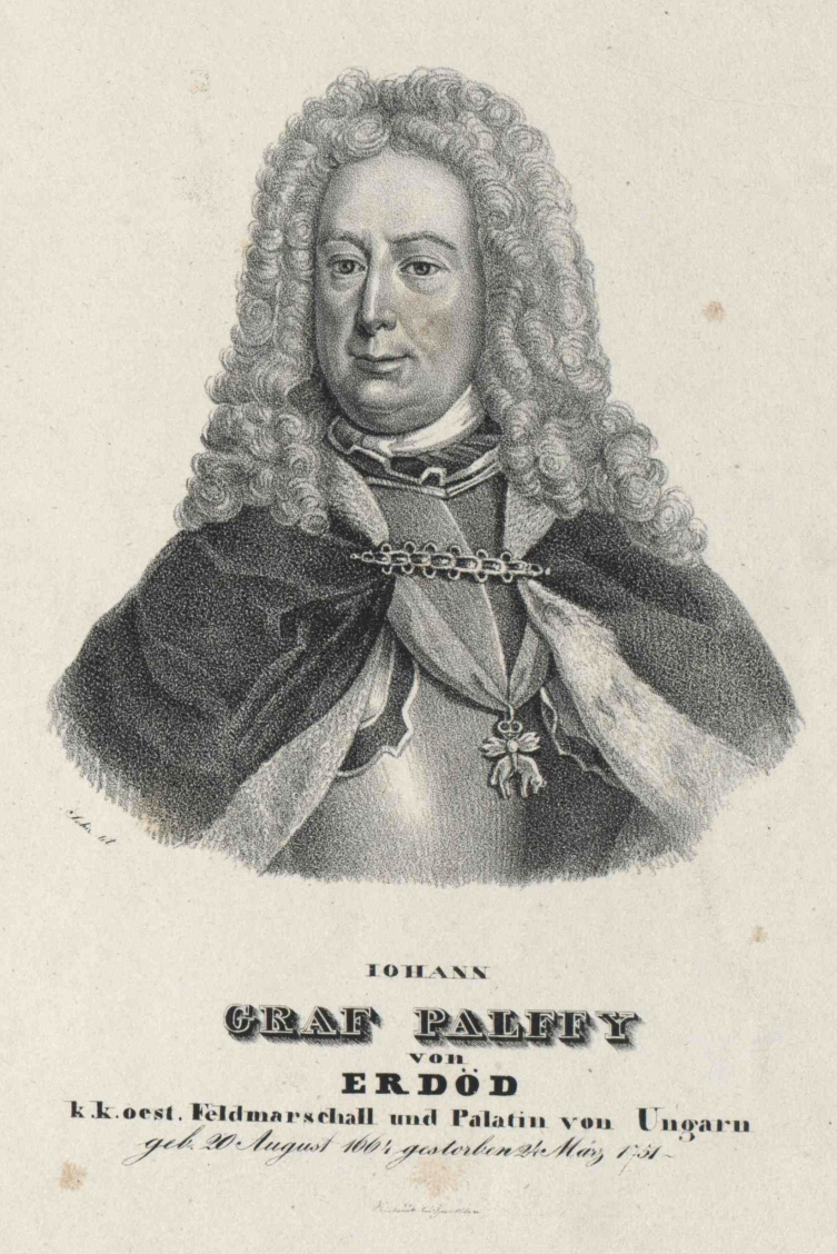 Pálffy-Erdöd, Johann Graf (1663 - 1751) Porträt